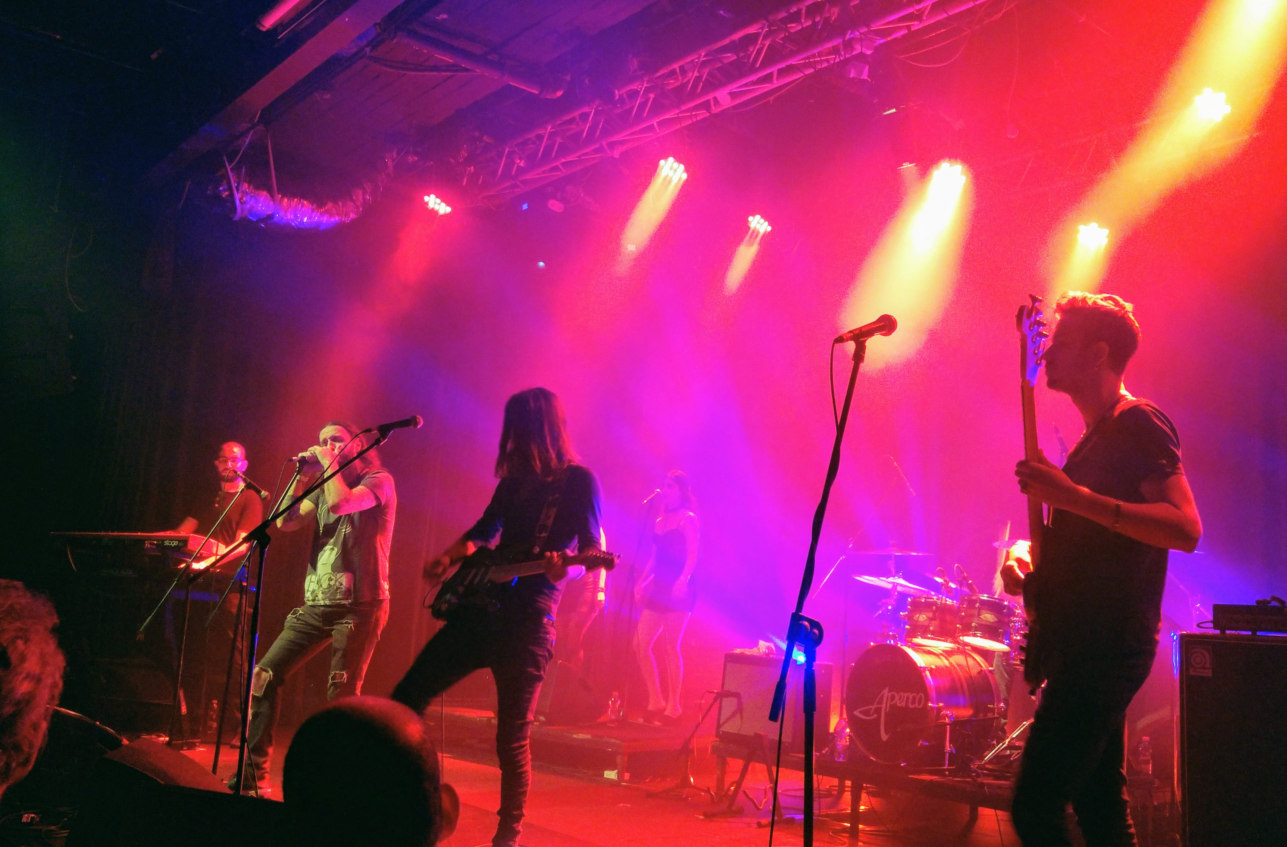 קובי פרחי עם להקת אפרקו במופע מחזירים את 88 אפ.אמ. למאזינים בנמל תל אביב